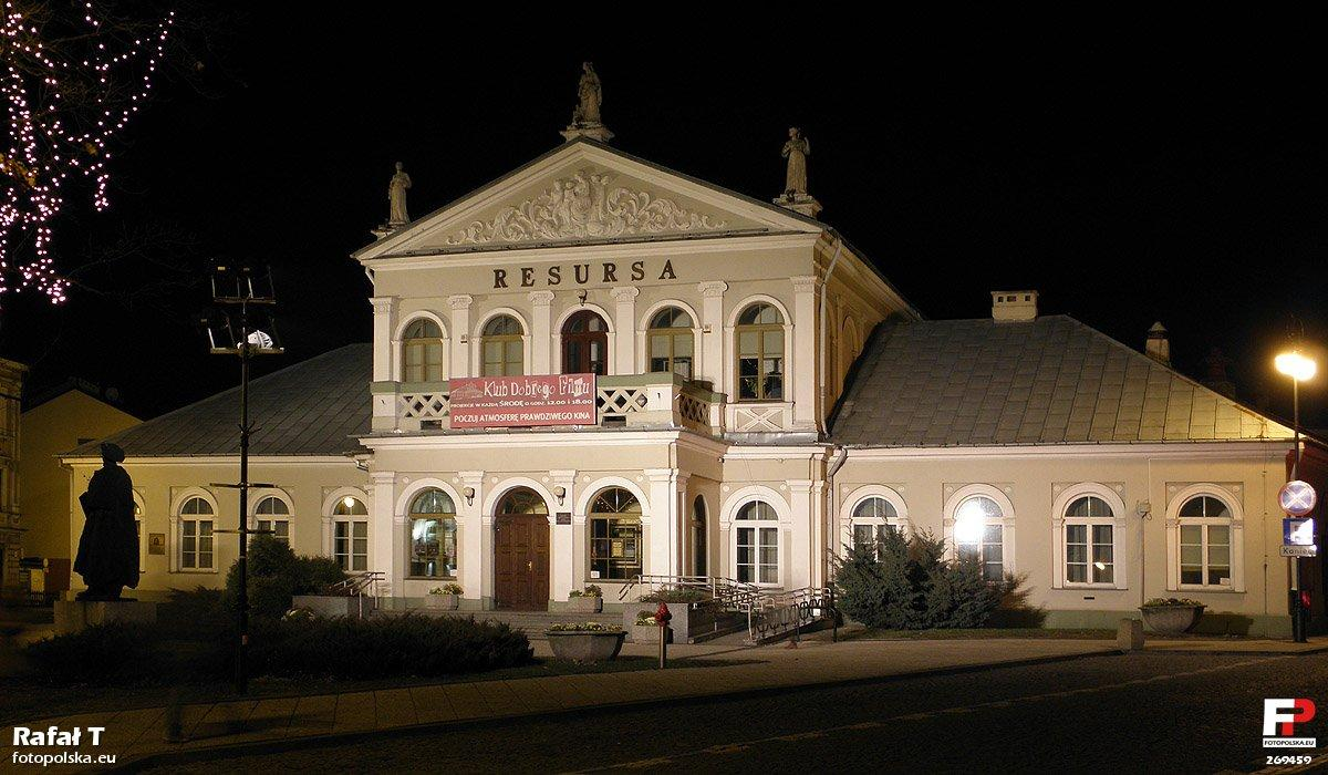 Resursa nocą.